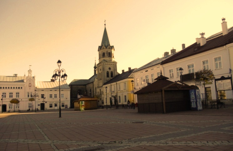 Церква і монастир. Францисканський костел Воздвиження Хреста Господнього в Сяноку: Kosciol_i_klasztor_OO._Franciszkanow_pw._Podwyzszenia_Krzyza_Swietego.